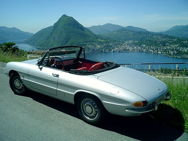 Alfa Romeo Spider Duetto cola larga, 1967 Alfa Romeo Spider 'Rundheck', Baujahr 1968, im Hintergrund Lugano. Eigenaufnahme von Mgloor (Löschen) (Aktuell) 11:29, 30. Okt 2005 . . Mgloor (Diskussion) . . 640 x 480 (116399 Byte) (Alfa Romeo Spider 'Rundheck', Baujahr 1968, im Hintergrund Lugano. Eigenaufnahme von Mgloor) (Löschen) (Zurücksetzen) 09:56, 28. Okt 2005 . . Mgloor (Diskussion) . . 640 x 480 (116681 Byte) (Alfa Romeo Spider 'Rundheck', Baujahr 1968, im Hintergrund Lugano. Eigenaufnahme von Marc O. Gloor, Zürich)